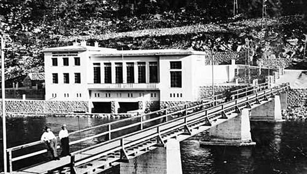 Српски (ћирилица): Хидроелектрана у Парежу 1940. године